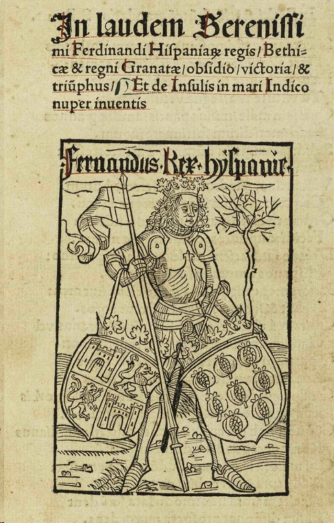 Grabado en loor de Fernando ii de Aragón tras la conquista del reino de Granada.